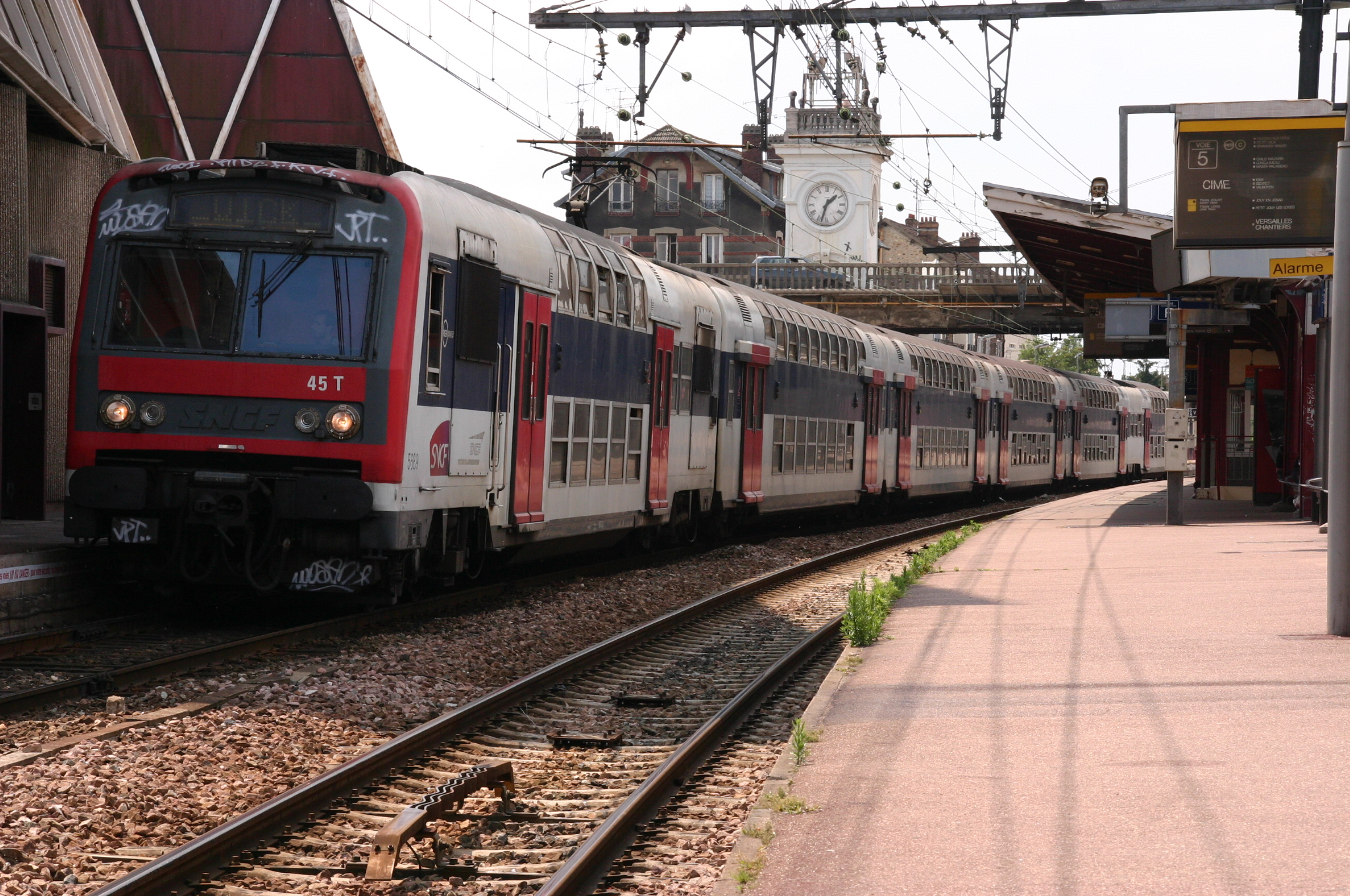 Gare de Juvisy, Juvisy-sur-Orge , département l'Essonne, France